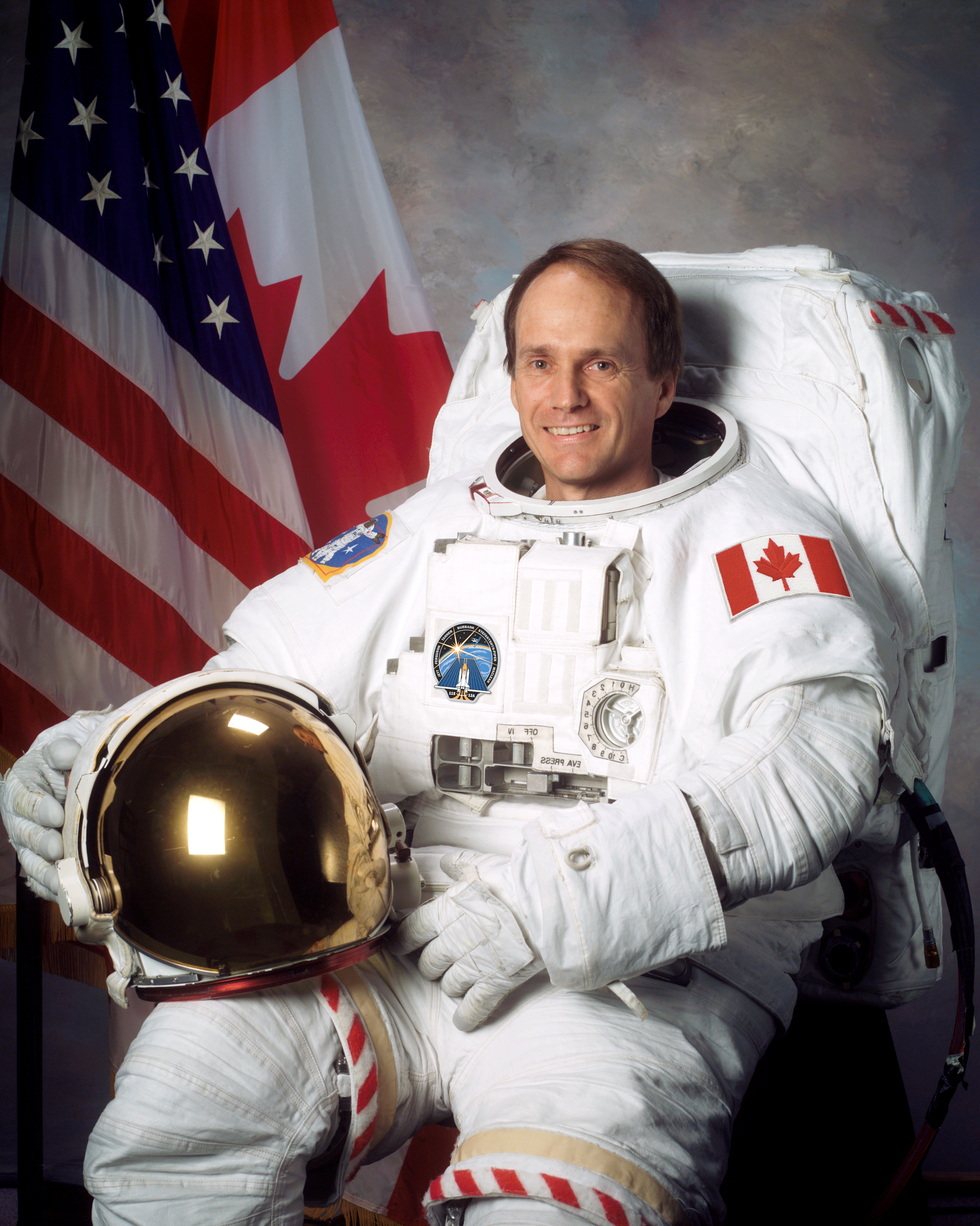 portrait astronaut Steven MacLean